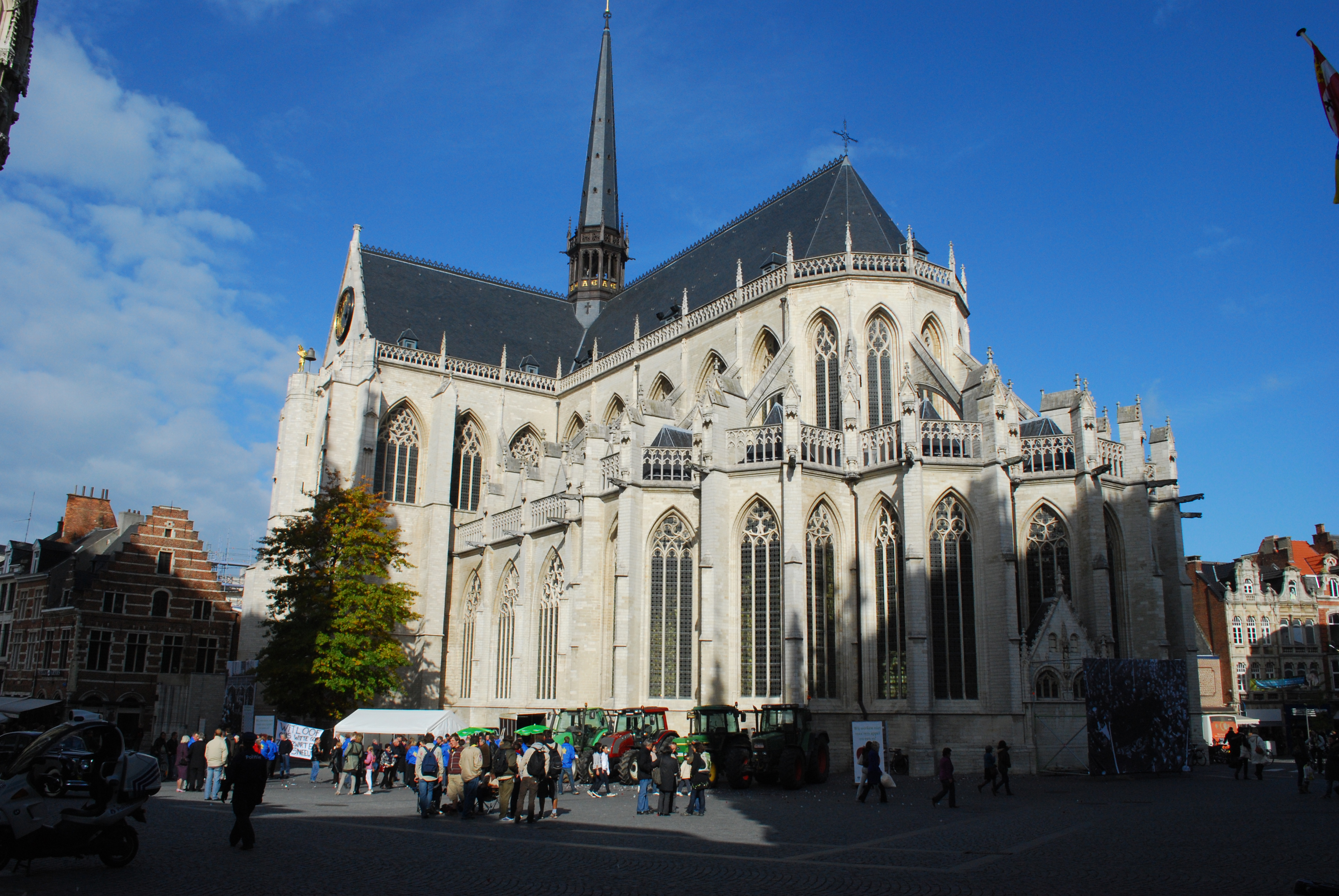 Leuven : église Saint-Pierre.